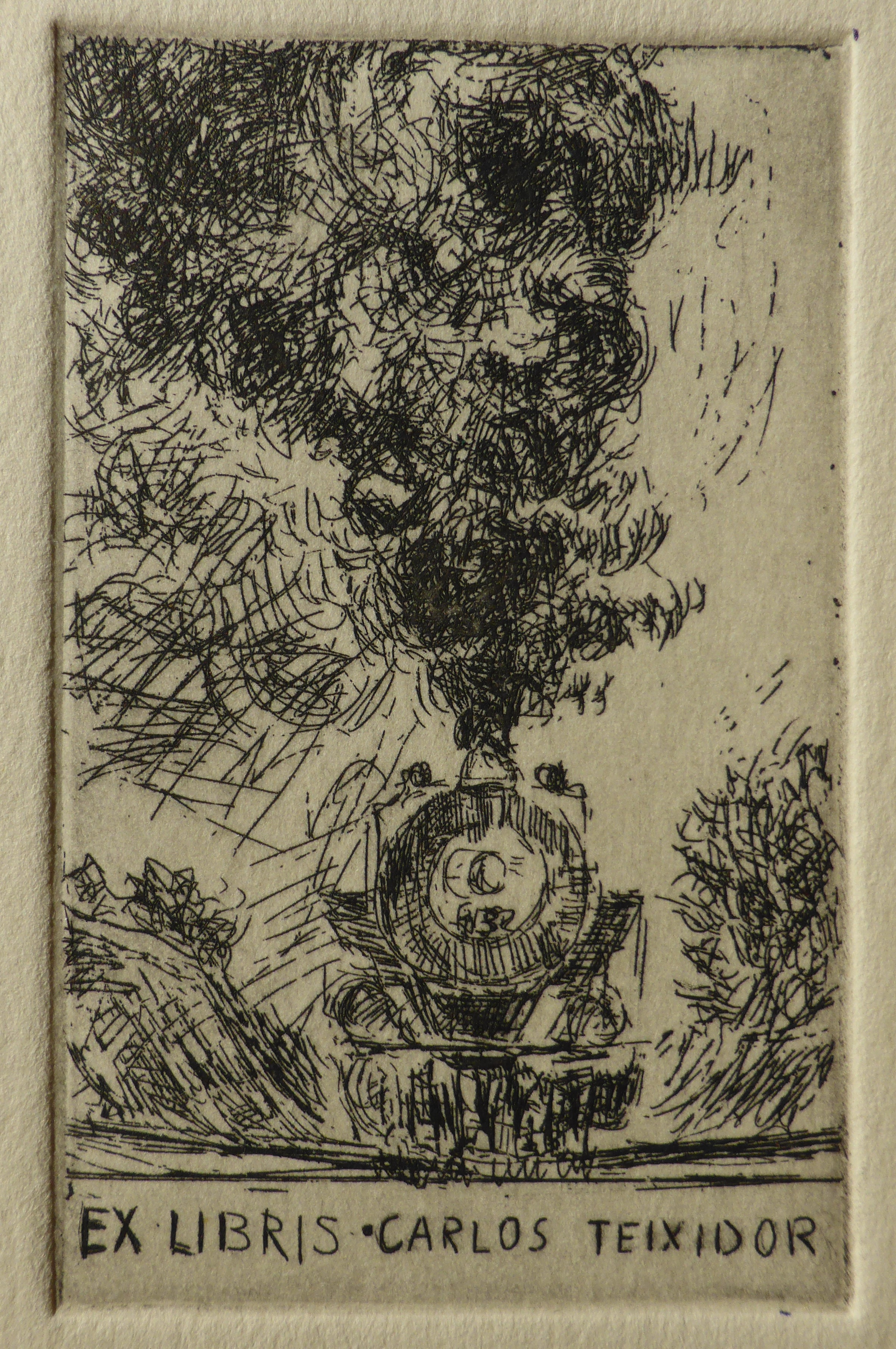 Exlibris de una biblioteca privada española. Es un diseño original, realizado exclusivamente para el destinatario. En 2017 se muestra en el Museo Casa de la Moneda, de Madrid, en la exposición temporal titulada: "El arte del grabado y el ferrocarril, del siglo XIX al XXI", hasta el 11 de junio. Este exlibris es del año 2016, realizado por la artista chilena Ximena Medina Sancho, con la técnica del grabado al aguafuerte.